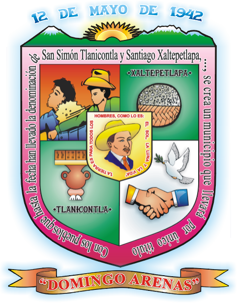 Escudo Municipal, de acuerdo con el DECRETO del Honorable Cabildo del Ayuntamiento del Municipio de Domingo Arenas, de fecha 30 de julio de 2009, por el cual instituye el "ESCUDO DEL MUNICIPIO DE DOMINGO ARENAS, PUEBLA"; Publicado en el PERIÓDICO OFICIAL del Gobierno Constitucional del Estado de Puebla, el viernes 23 de julio de 2010. Fuente